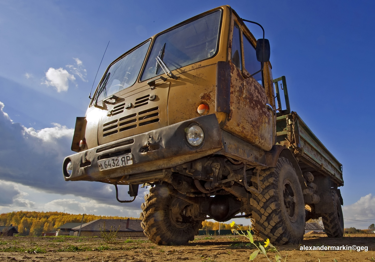 KAZ 4540 (Kolhida)